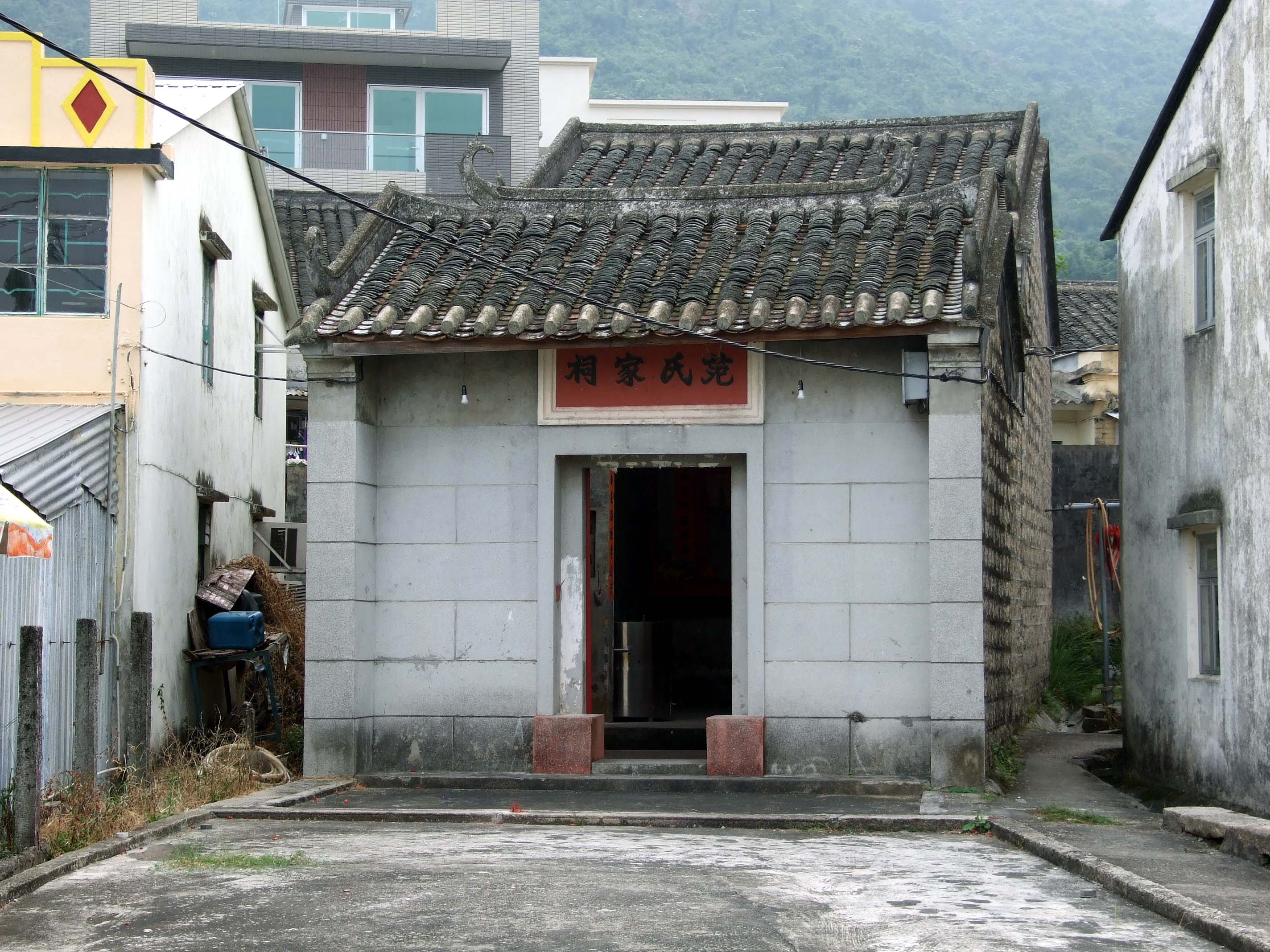 中文（香港）: 界元朗八鄉河背村13號范氏家祠